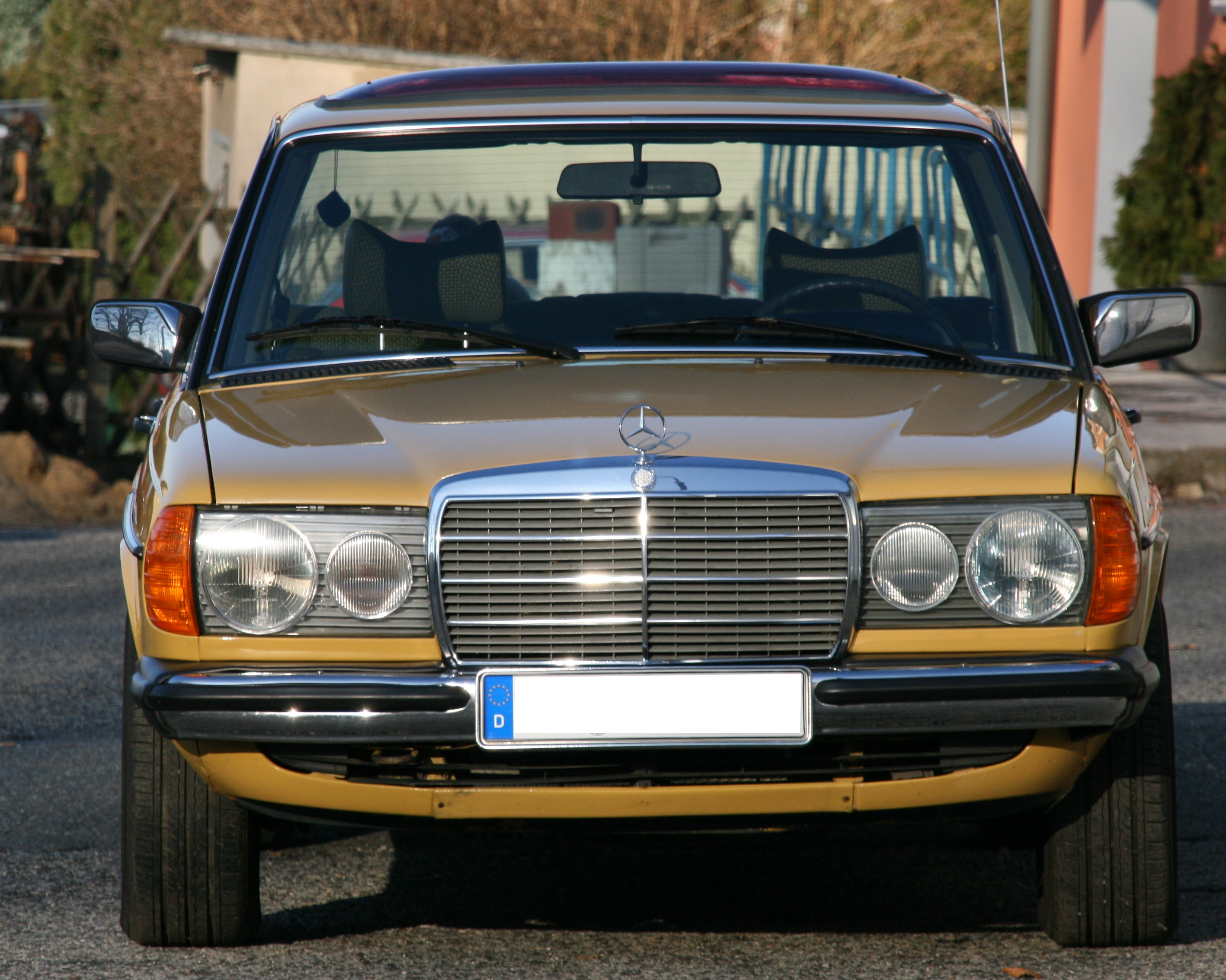 MB 230 W123 Baujahr 1977 erste Serie